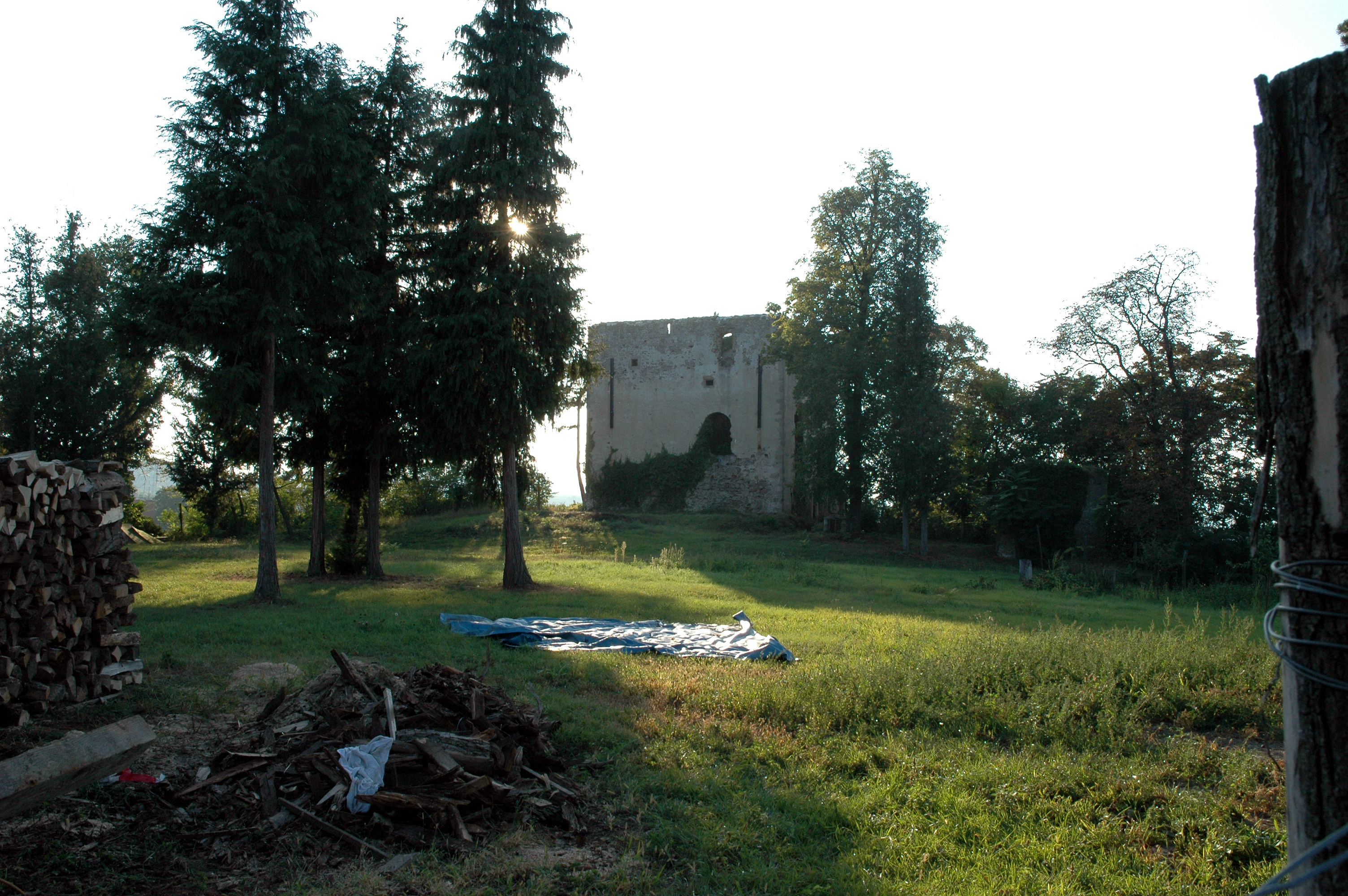 Kleinkastell und Hausberg Bertholdstein